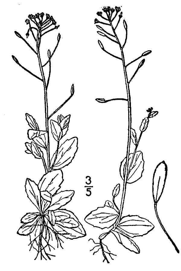 Draba nemorosa L. - woodland draba